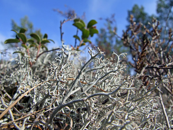 Cladonia arbuscula